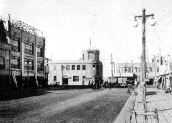 香川県高松市の現・中央通りの前身となった記念道路。第二次大戦にかけての昭和時代の撮影。南から現・高松駅前交差点を見る。